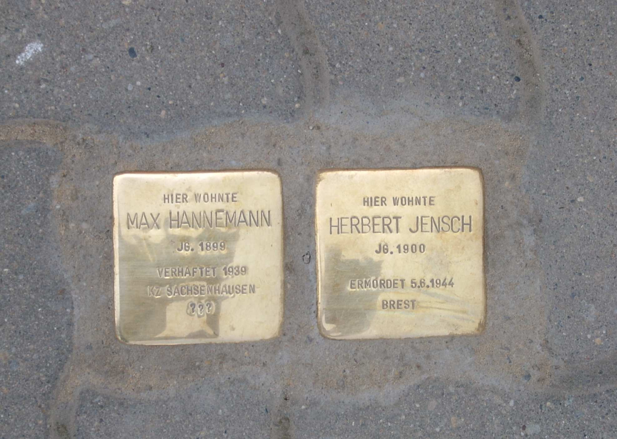 "Stolpersteine" in Frankfurt (Oder) vor der Kleinen Oderstraße 7 als Gedenken an die Opfer des Nationalsozialismus